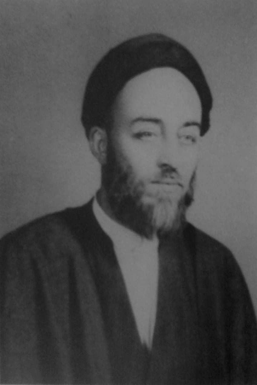 Allame Sayyed Mohammad Hossein Tabatabaei, in young ages-tabatabaee-tabatabai-mohamad hosin tabatabaee-mohamadhosein tabatabaee-mohammadhosein tabatabaee-mohammadhosein tabatabai--tabatabaey-mohamadhosein tabatabaey-mohamad hosein tabatabaey-mohammad hosein tabatabaey-mohammadhosein tabatabaey